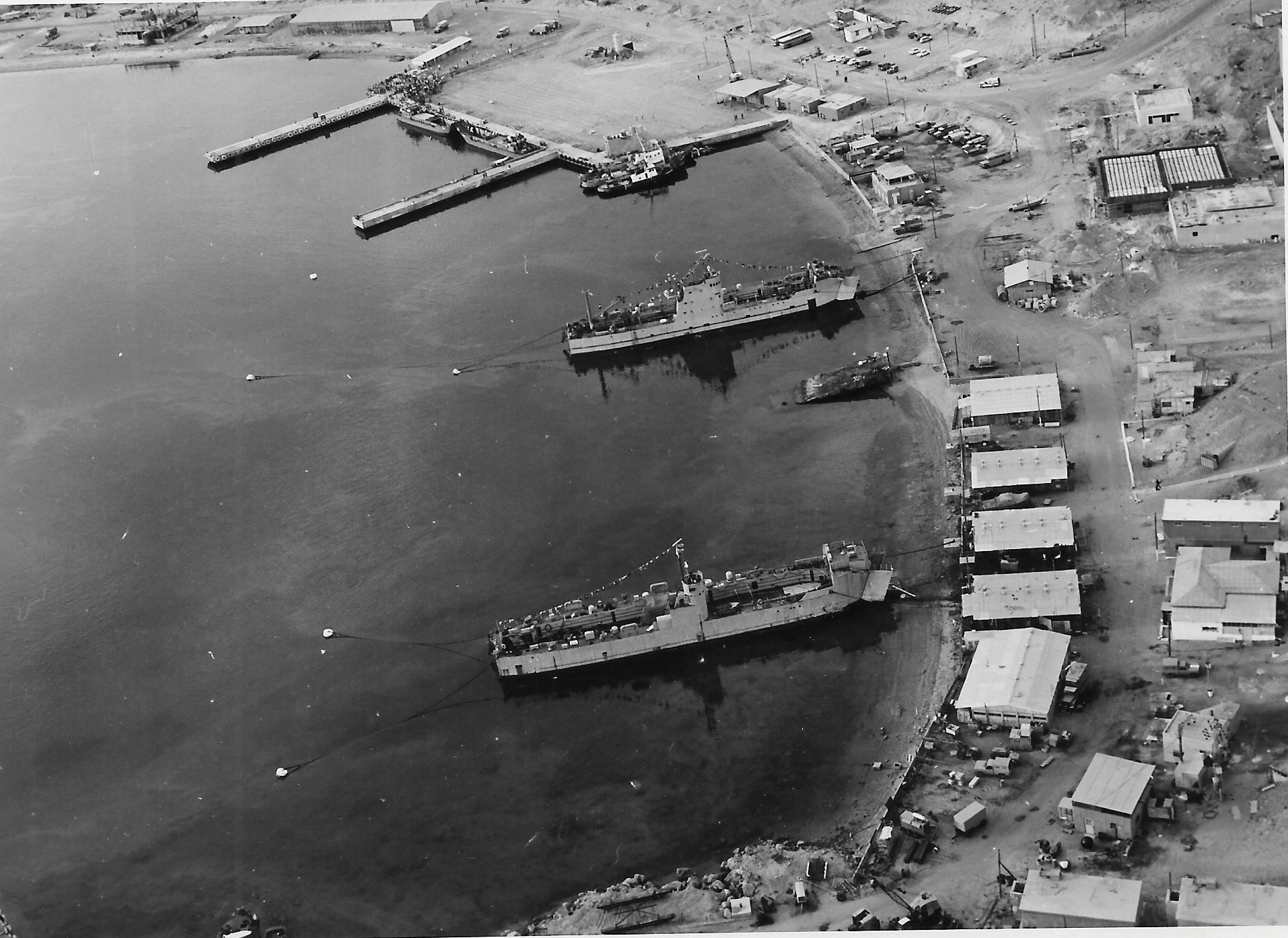 מעגן שארם א-שייח' מוכן לקליטת ספינות סער, 1973